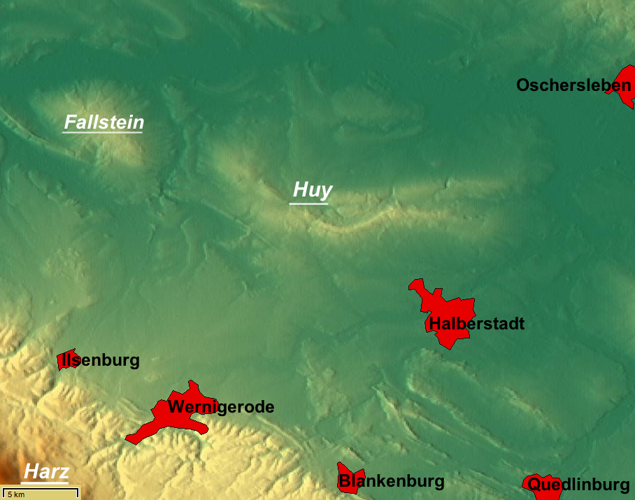 Reliefkarte der beiden Höhenzüge Fallstein und Huy in Sachsen-Anhalt, Deutschland; unten links ein Teil des Harz. – Die Karte ist genordet, ein grober Maßstab ist unten links; zur Orientierung sind größere Städte eingezeichnet.